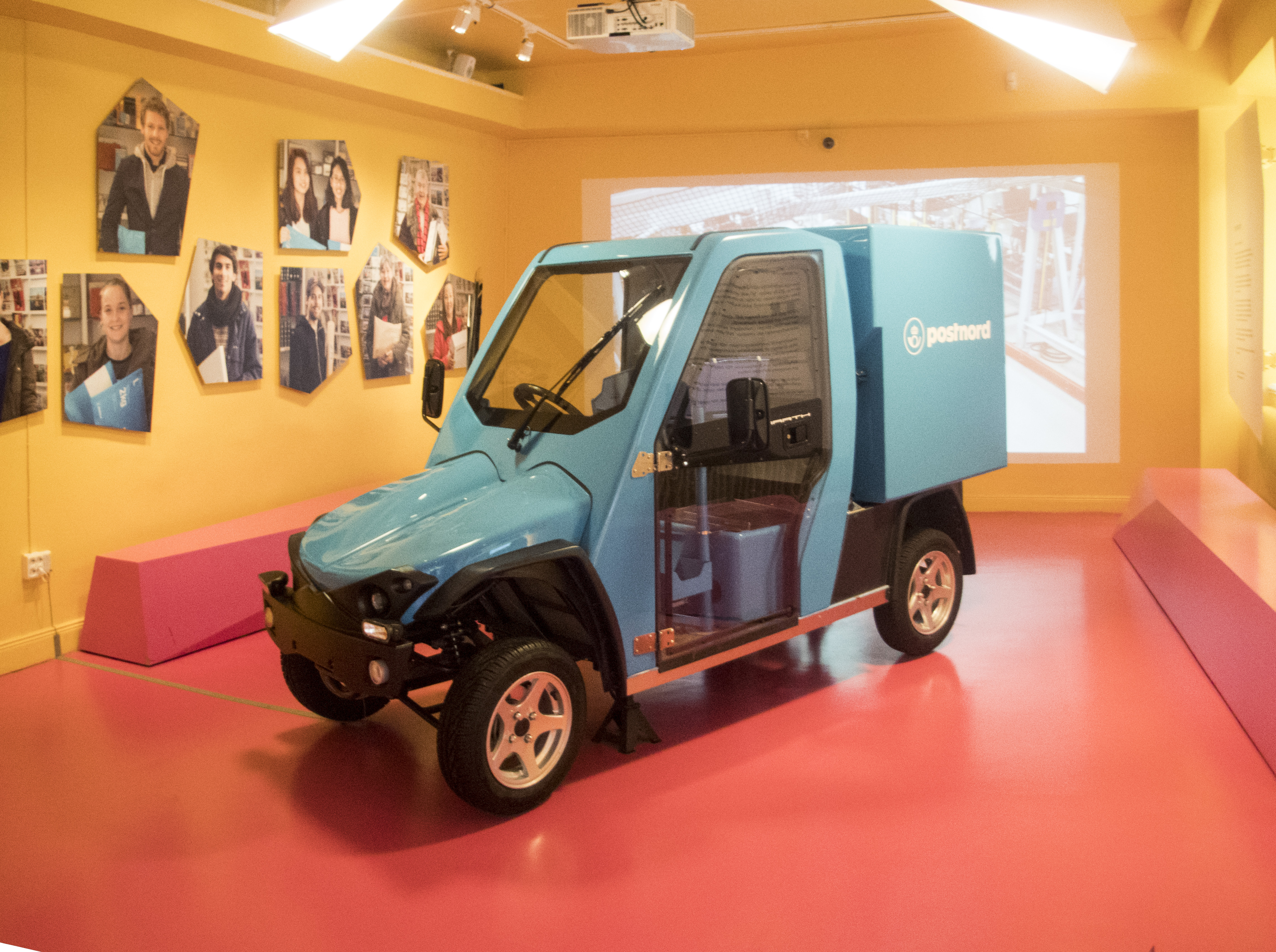 Postmuseum i Stockholm 2017